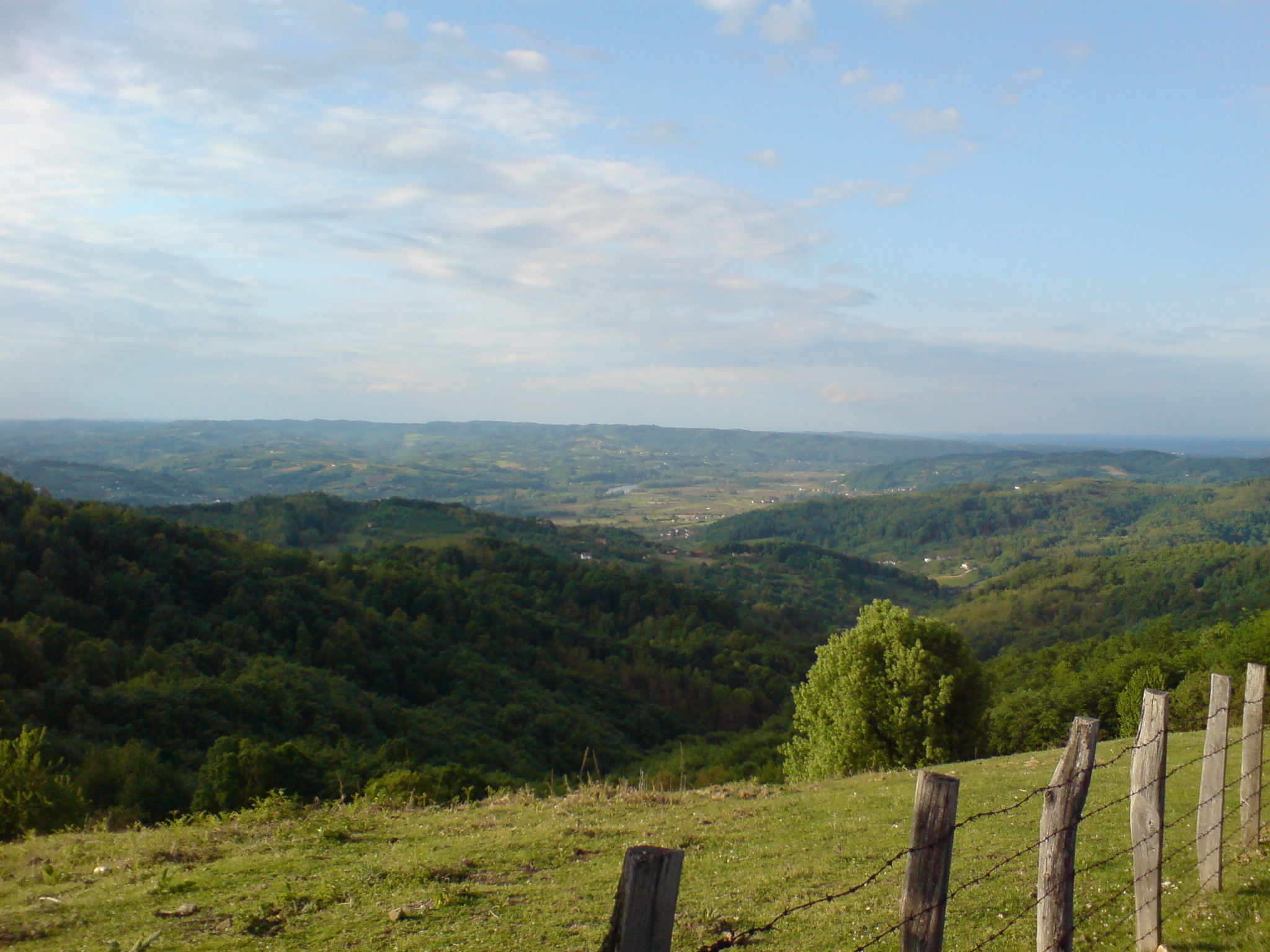 Pogled s planine Trebave na selo Vranjak i dolinu rijeke Bosne.